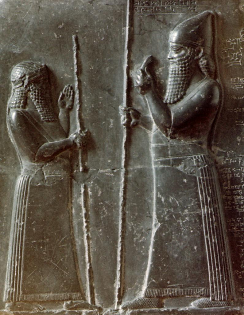 Berlin, Pergamon Múzeum, „Babilon-Saal”: II. Marduk-apal-iddina törvényoszlopa. Babilon, i. e.721-711 k. (részlet, fekete márvány)